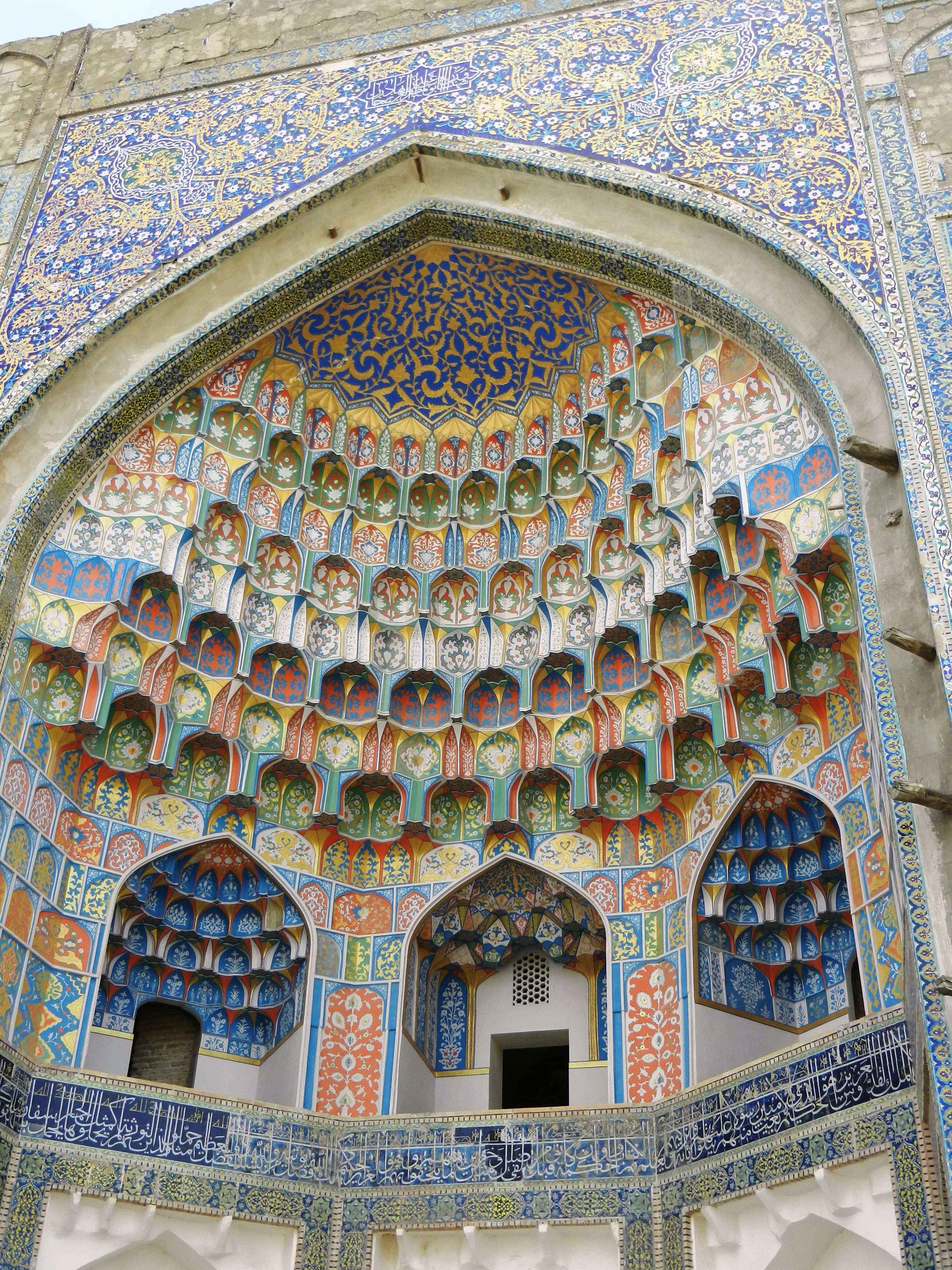 Detajl ivana v Ulugbekovi medresi v Buhari, Uzbekistan.